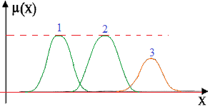 рисунок 1